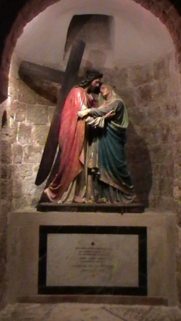 התחנה הרביעית בויה דלרוזה- המפגש בין ישו למריה. הכנסייה הארמנית הקתולית בירושלים